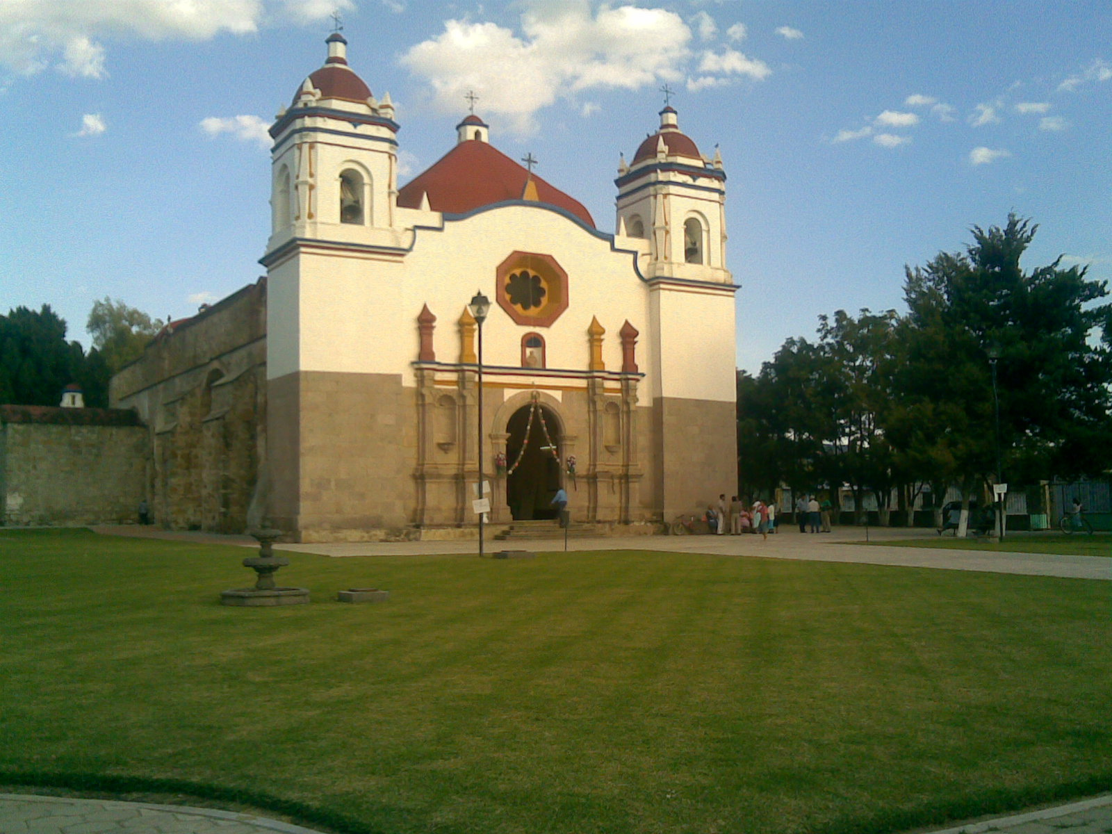 Iglesia Construida a finales del Siglo XVII y Principios del siglo XVIII